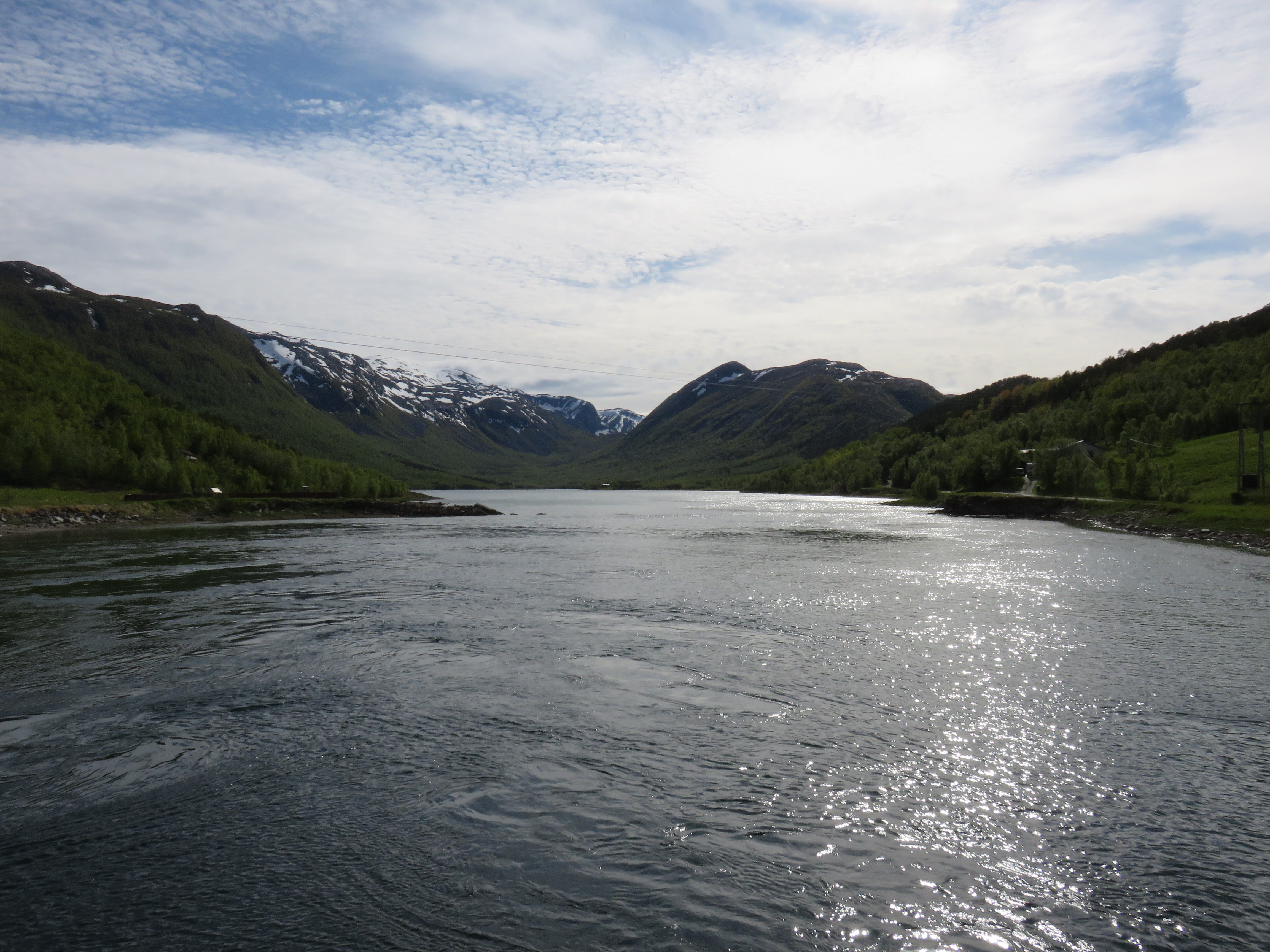 Vargfjorden, mot sørvest fra brua.